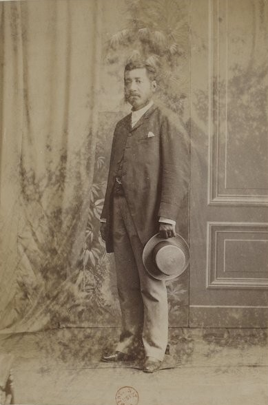 Vue 10. Recueil. Îles Hawaï. III. Types. Documents iconographiques rassemblés par Louis Pierre Vossion.